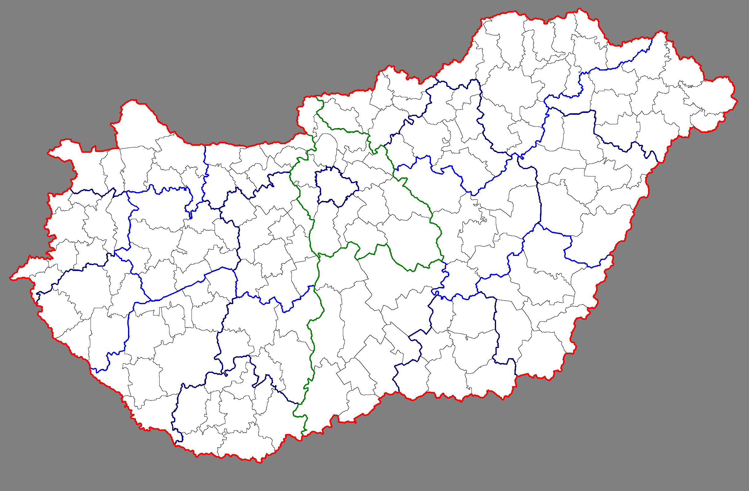 Magyarország NUTS térképe, 2007. január 1. A különböző NUTS szintek határa más-más színnel jelölve. Teljesen lecsupaszított bitkép